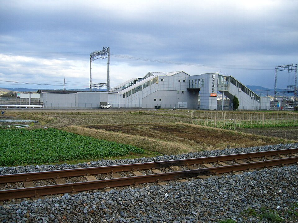 木津川台駅遠景 手前の線路はJR片町線 2007年3月6日 Bakkai撮影